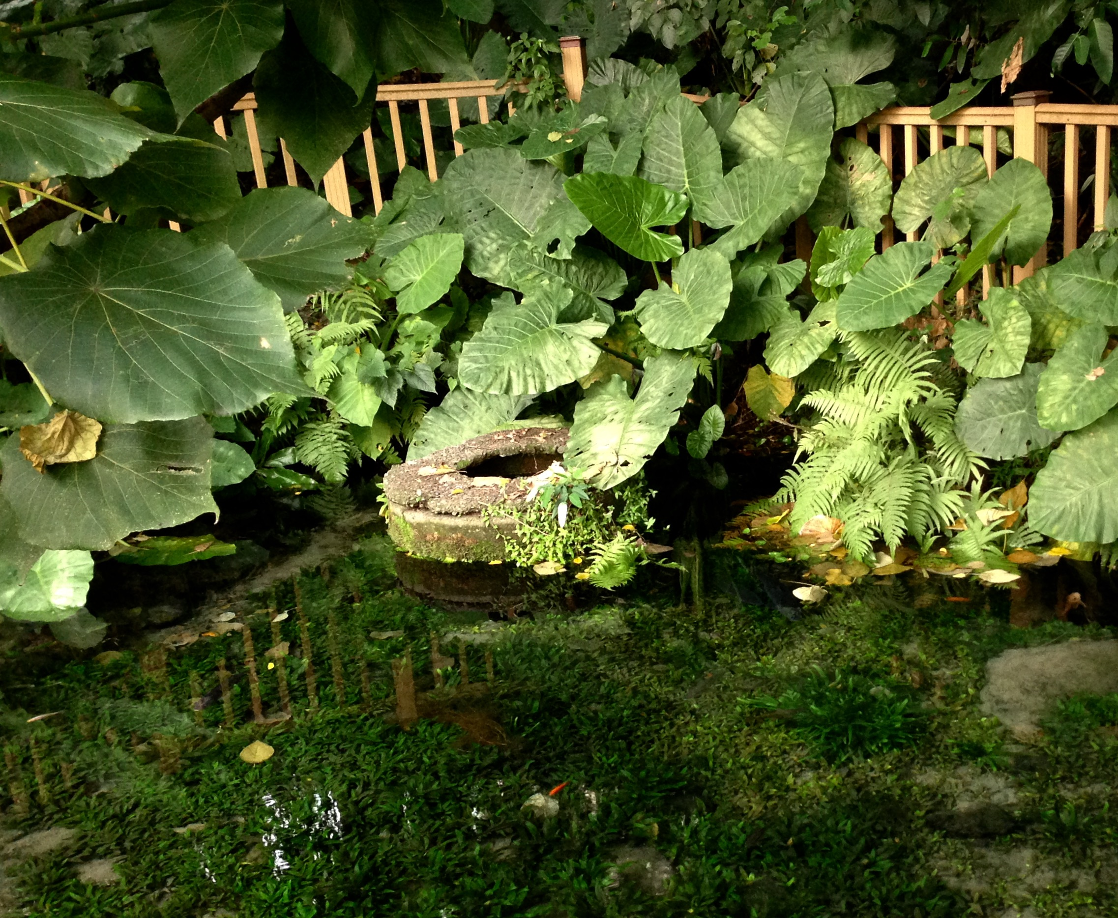 八芝蘭番仔井，芝蘭八景之一。